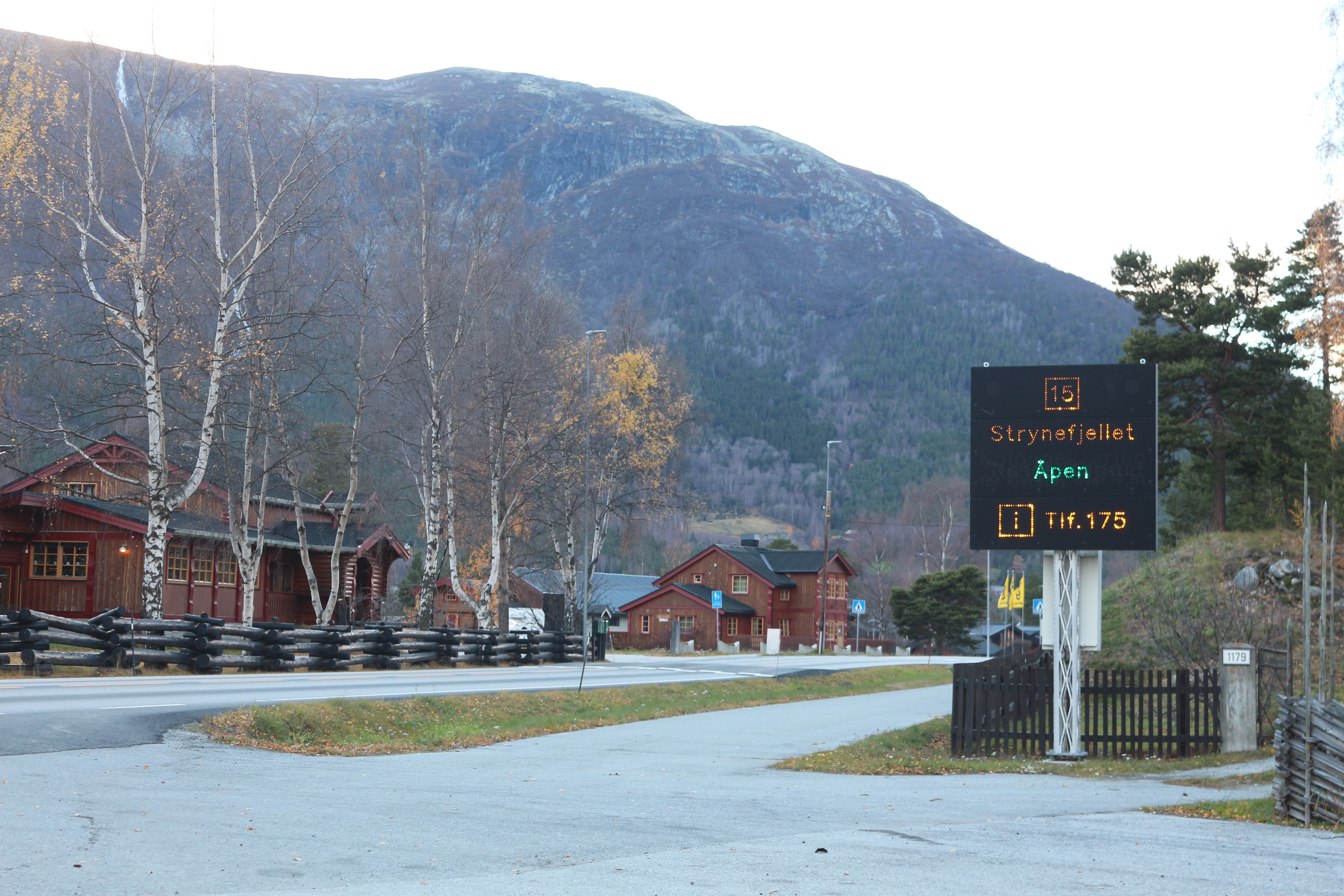 Riksveg 15 ved Bismo